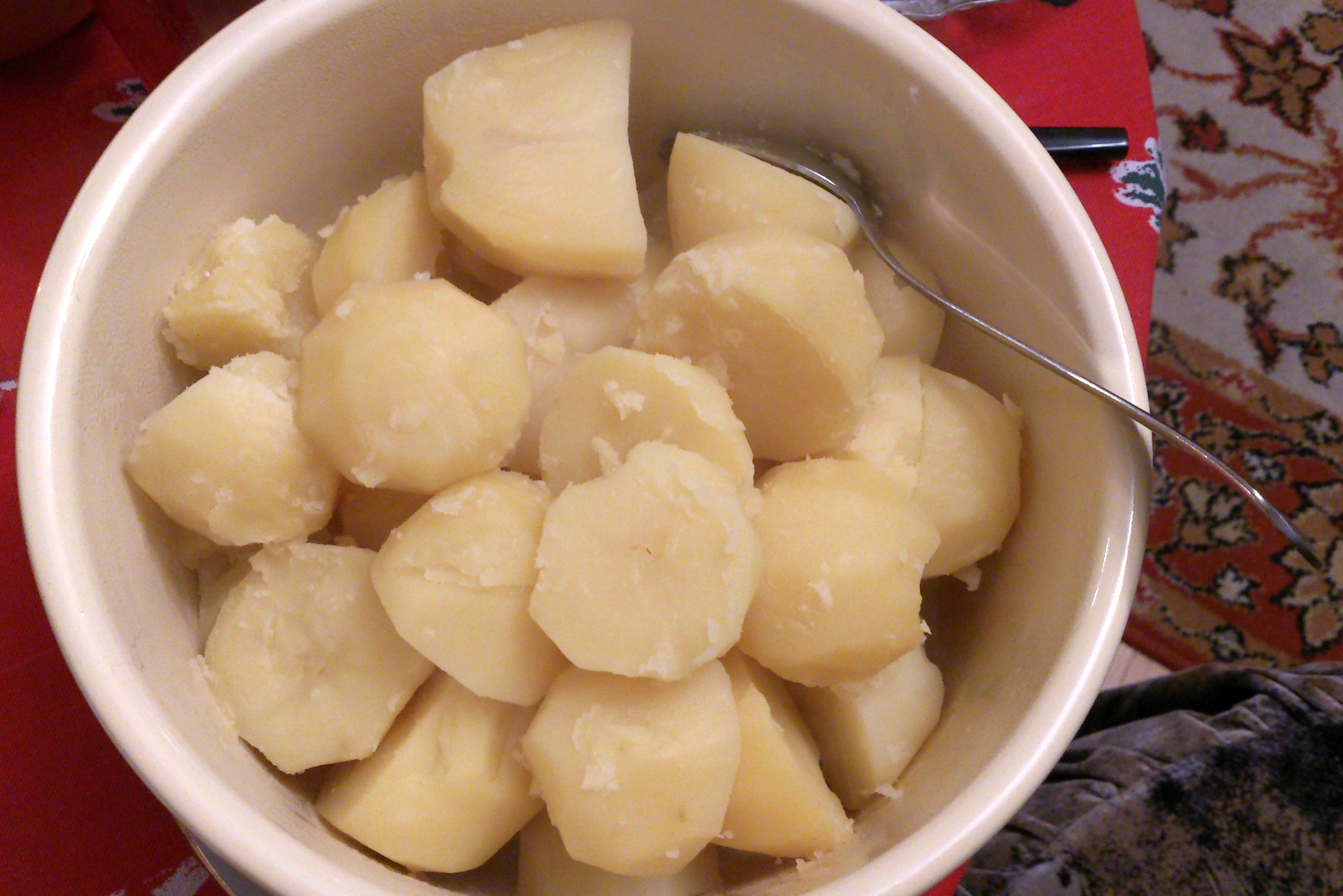 Keedukartulid